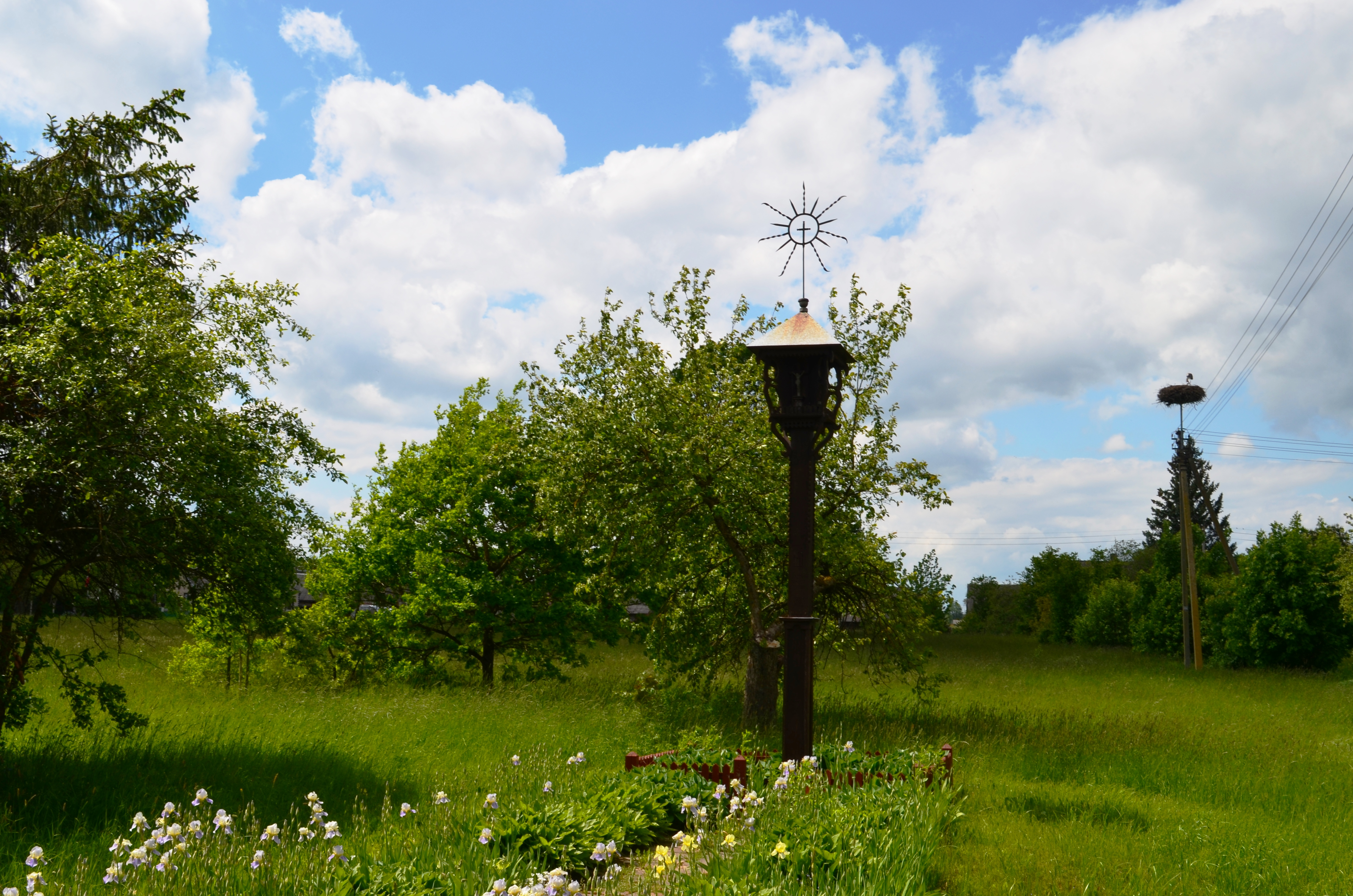 Levaniškiuose stogastulpis, Anykščių raj.